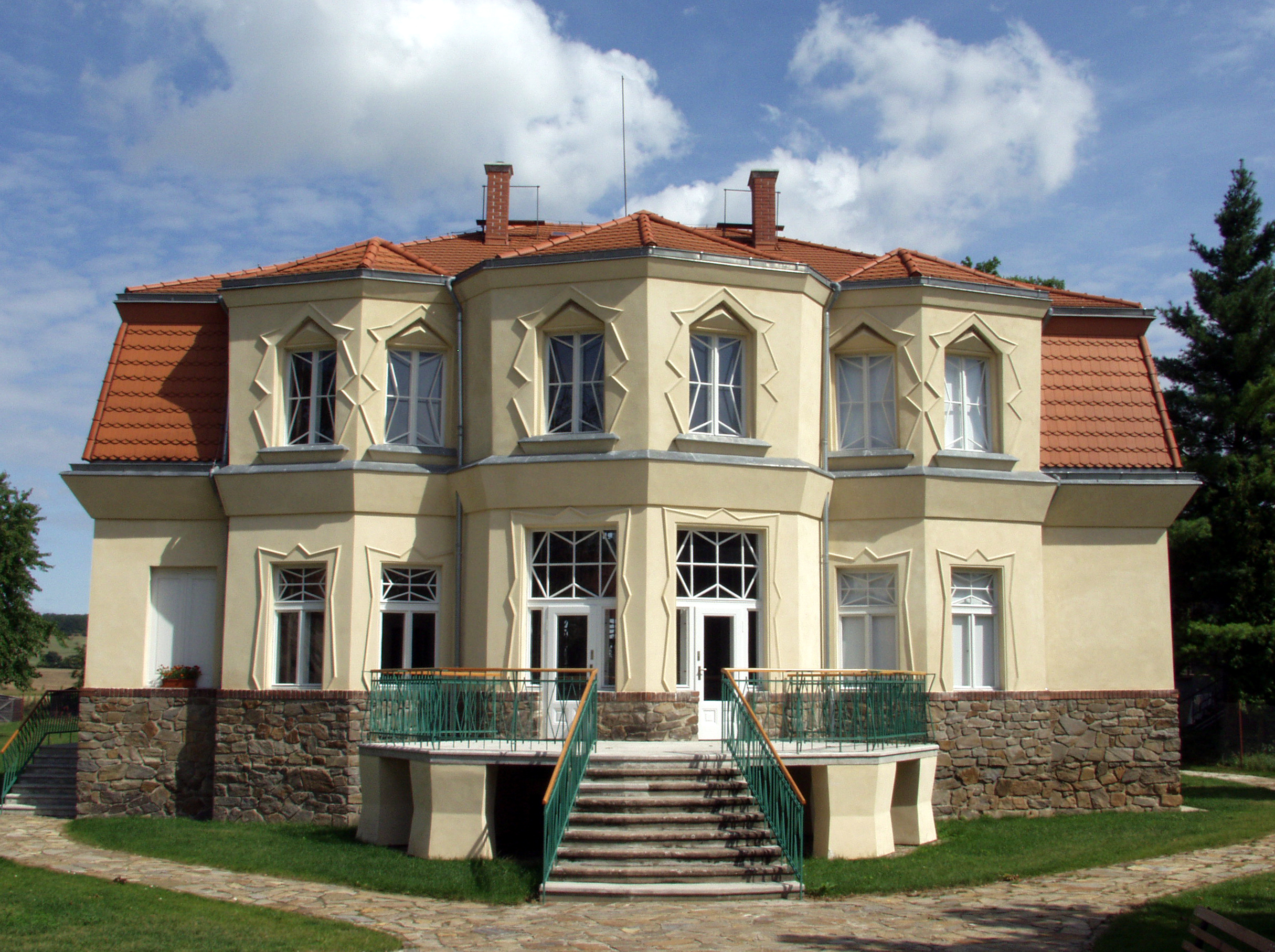 Bauerova vila, postavená v Libodřicích podle projektu Josefa Gočára a jediná kubistická vila, stojící na českém venkově.